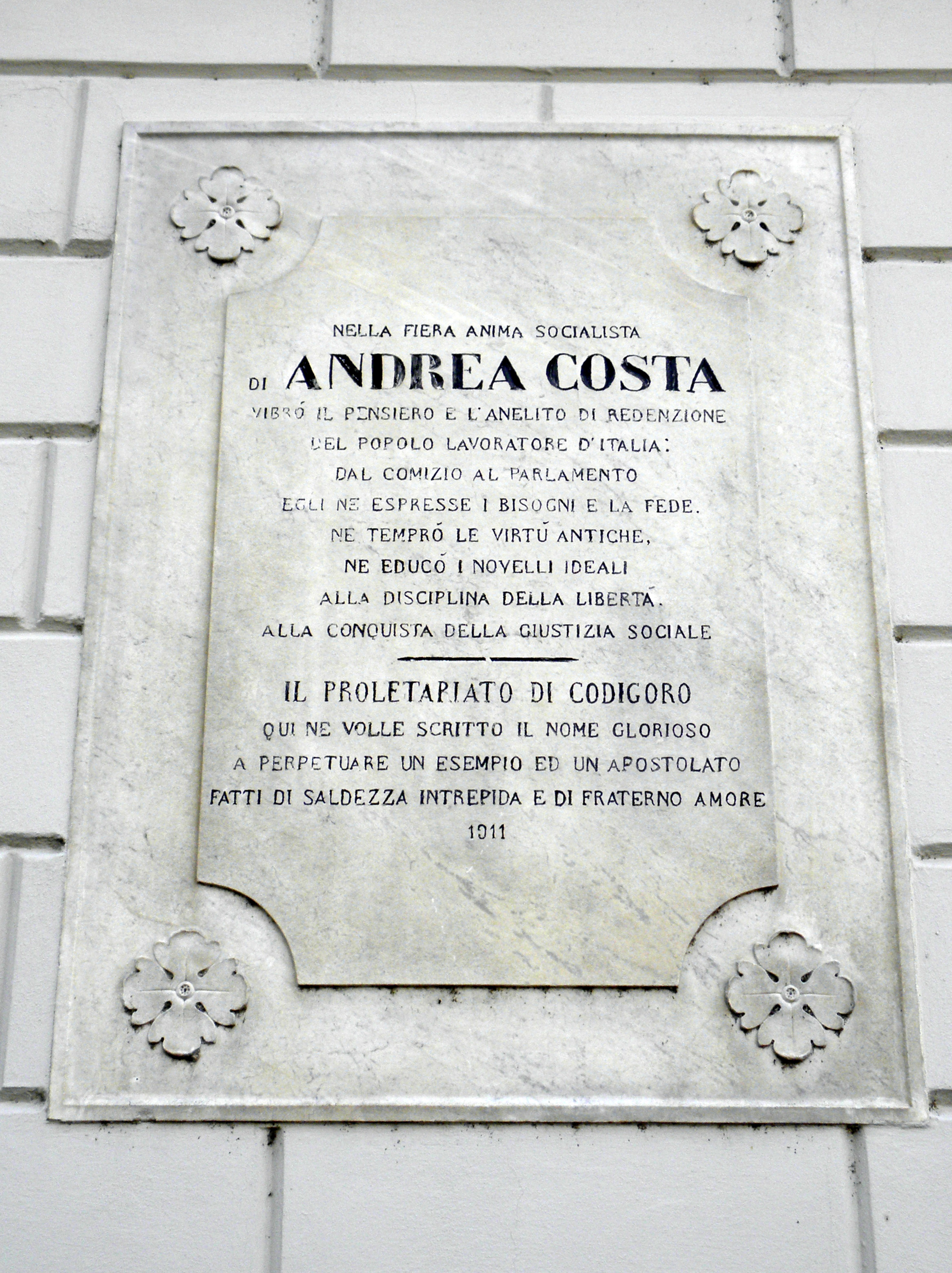 Codigoro, lapide commemorativa dedicata al politico Andrea Costa.